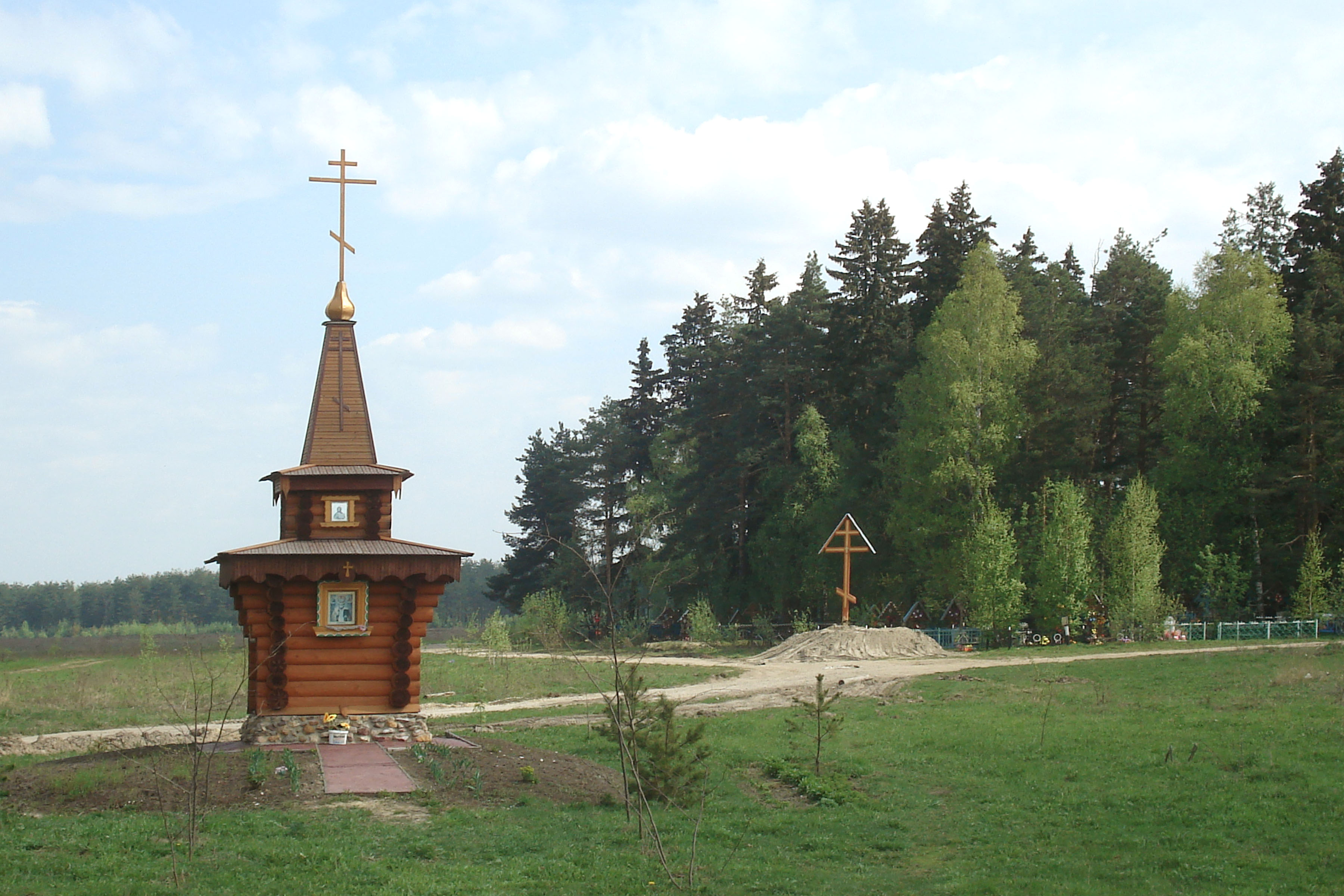 Modern chapel about Davydovo cemetery (Guslitsa, Moscow region) \ Часовня около кладбища деревни Давыдово (Гуслицы, Орехово-Зуевский район М.О.)